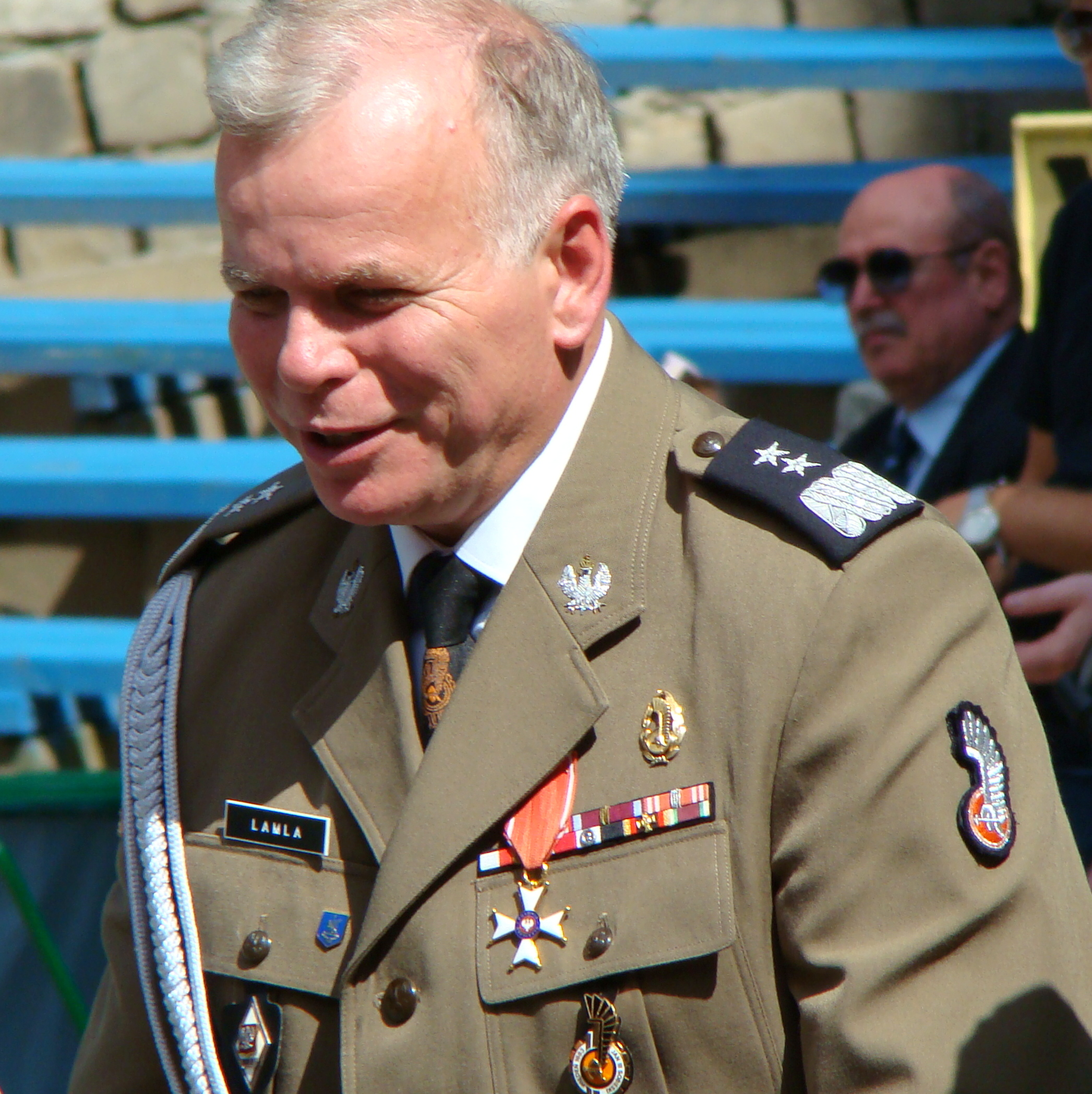 Generał dywizji Paweł Lamla w 2008 r., jako dowódca 11 Lubuskiej Dywizji Kawalerii Pancernej